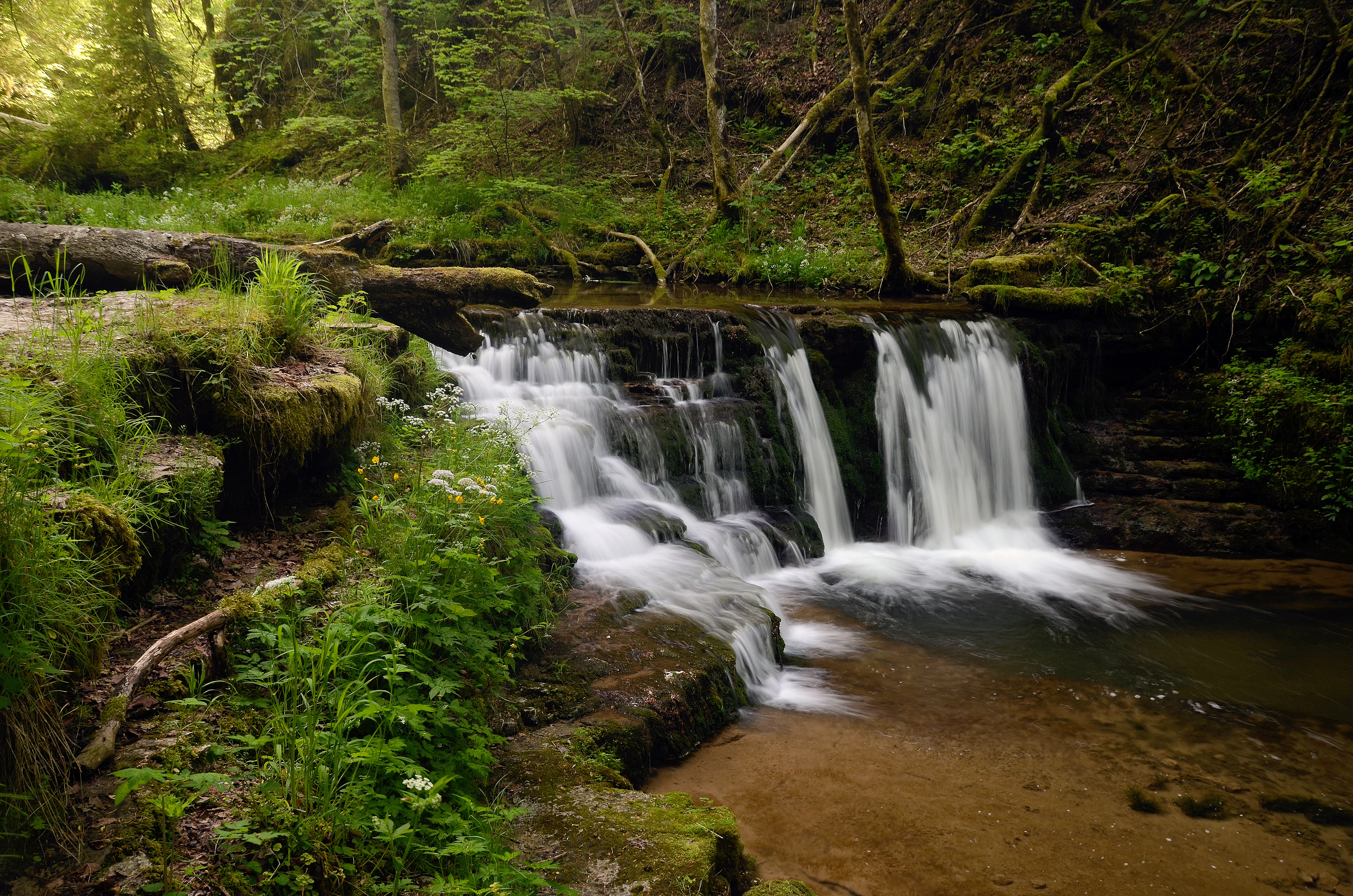 Bachlauf der Gauchach in der Gauchachschlucht (Nebenschlucht der Wutachschlucht), größerer Wasserfall 01